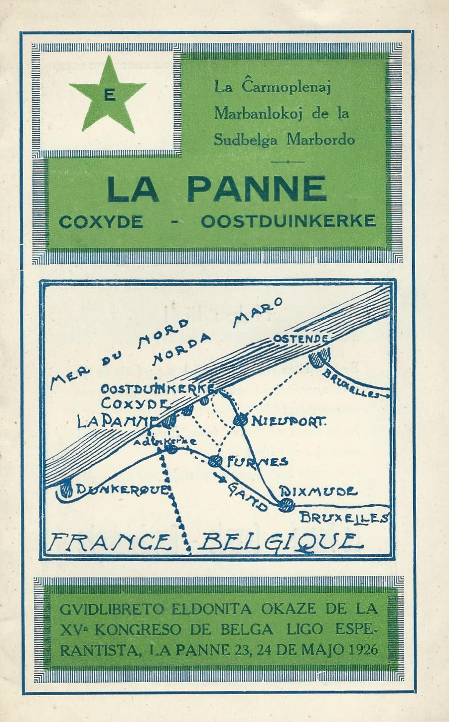 Anonima dokumento "La Panne" el 1926